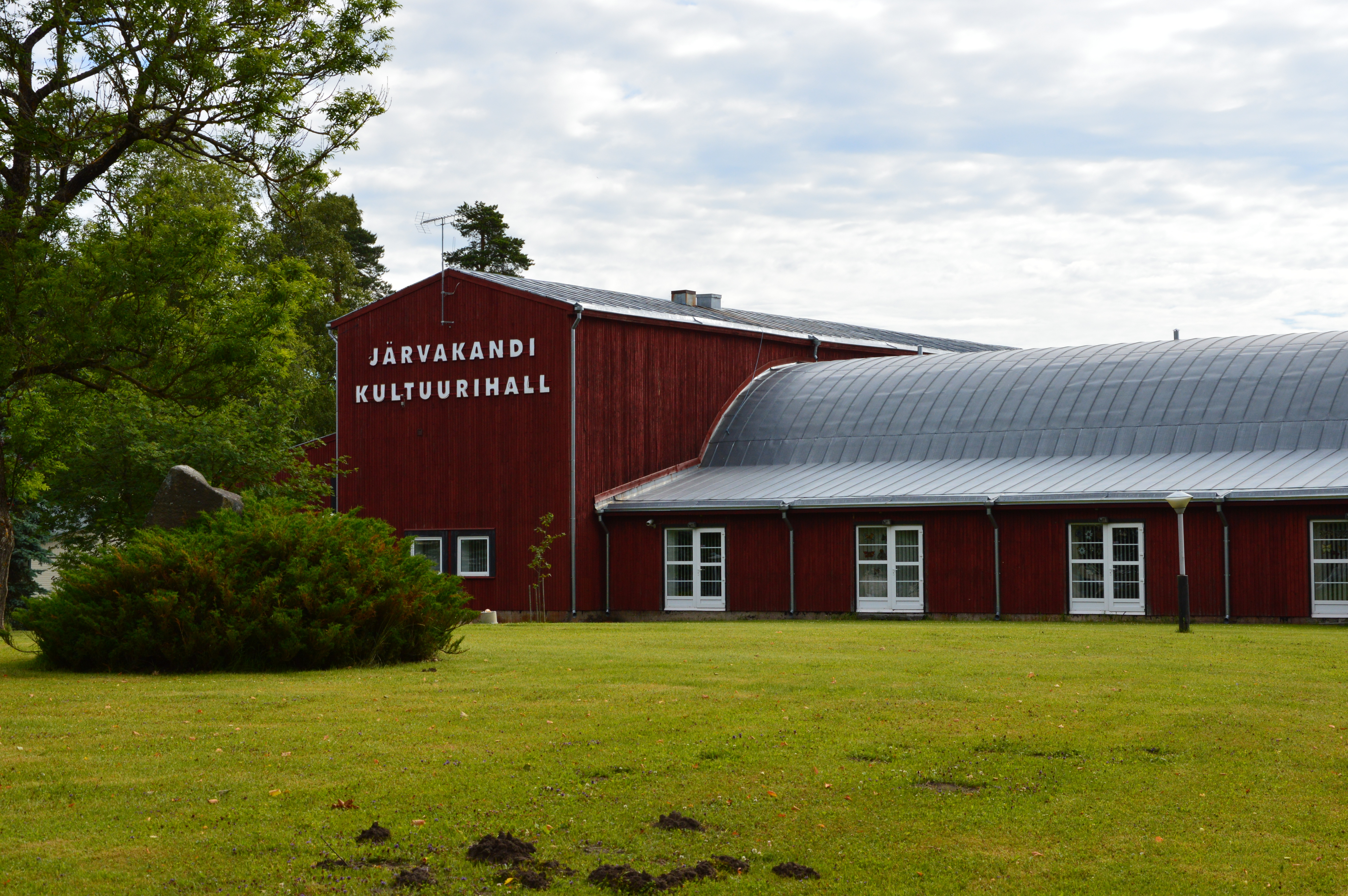 Järvakandi Kultuurihall